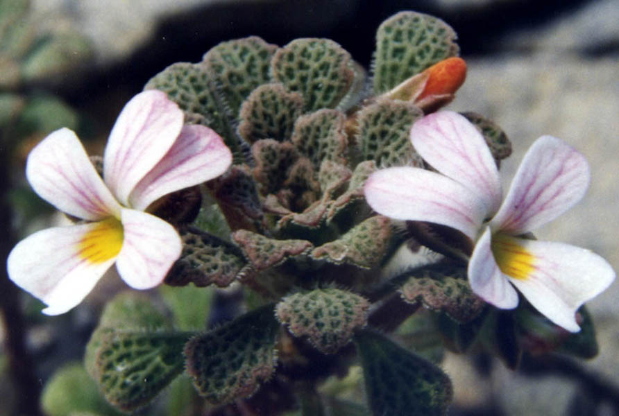 Viola philippi